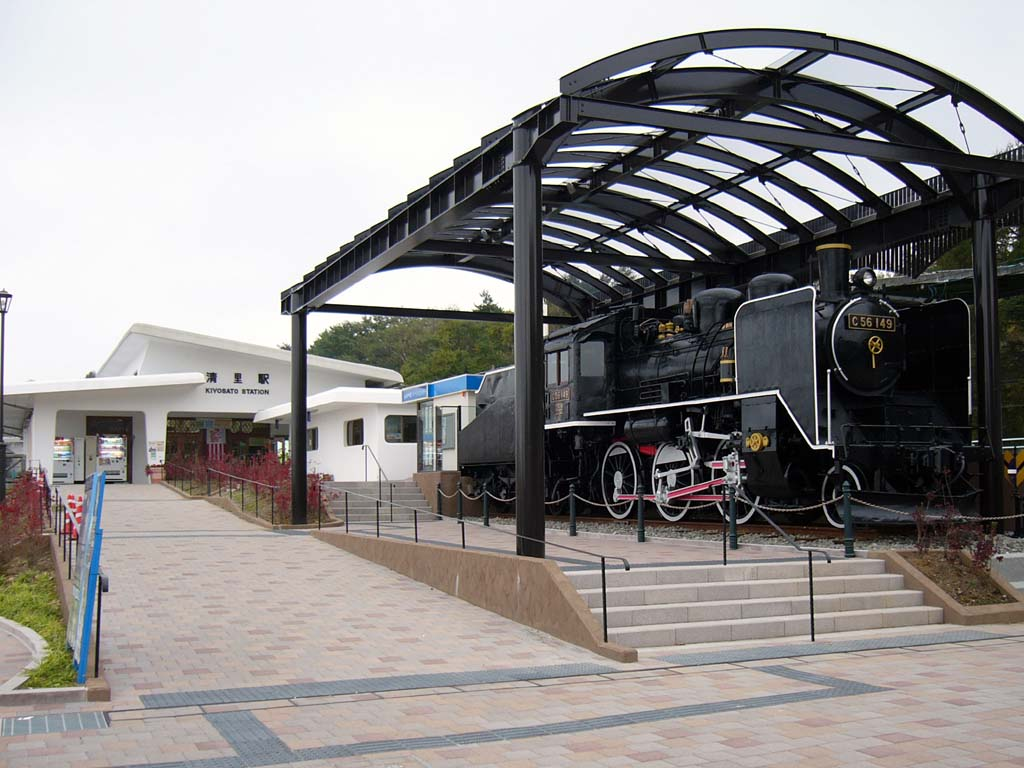 清里駅とC56 149（2009年の駅前改修事業に伴い清里駅前に移転）